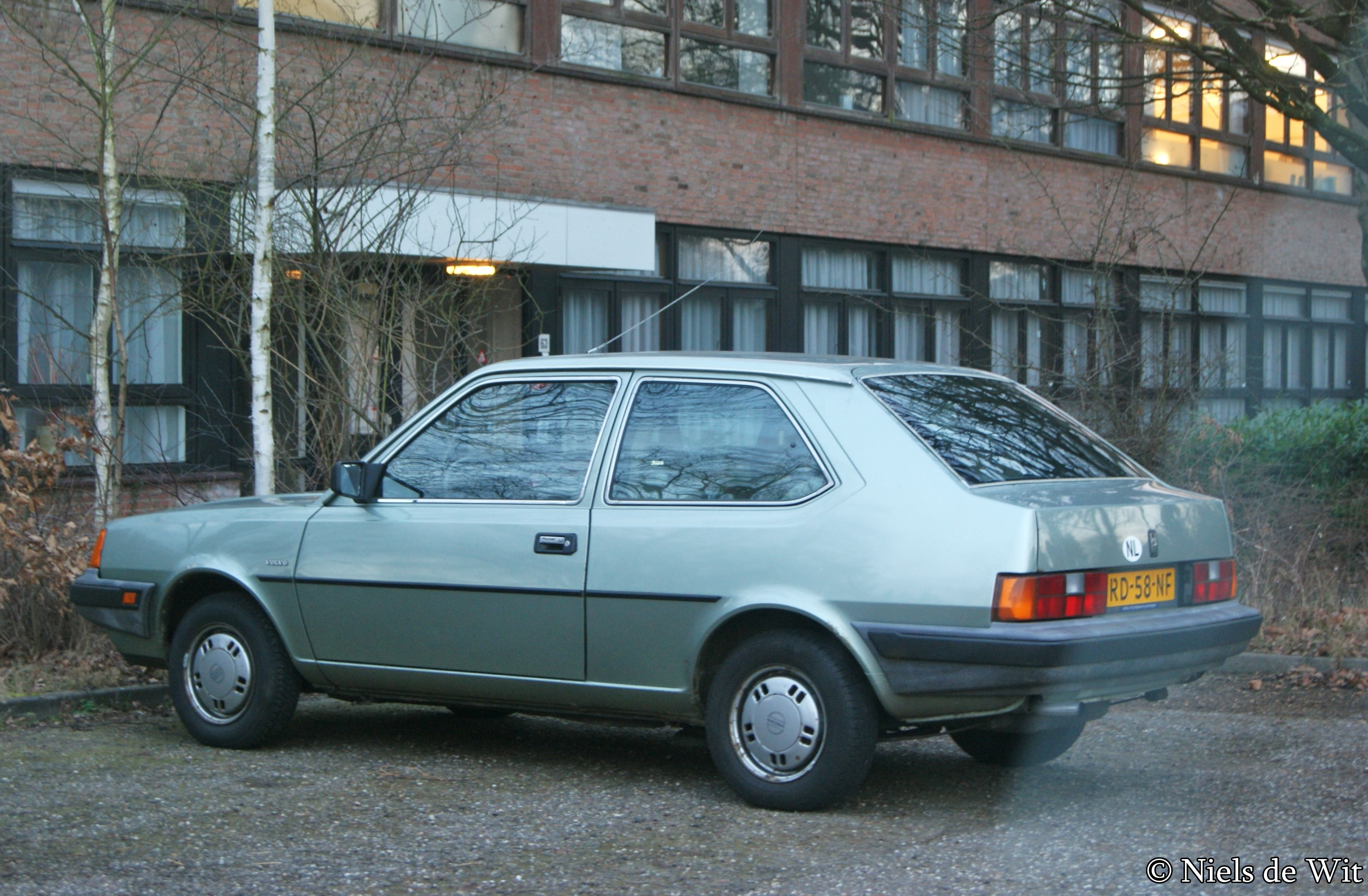 RD-58-NF